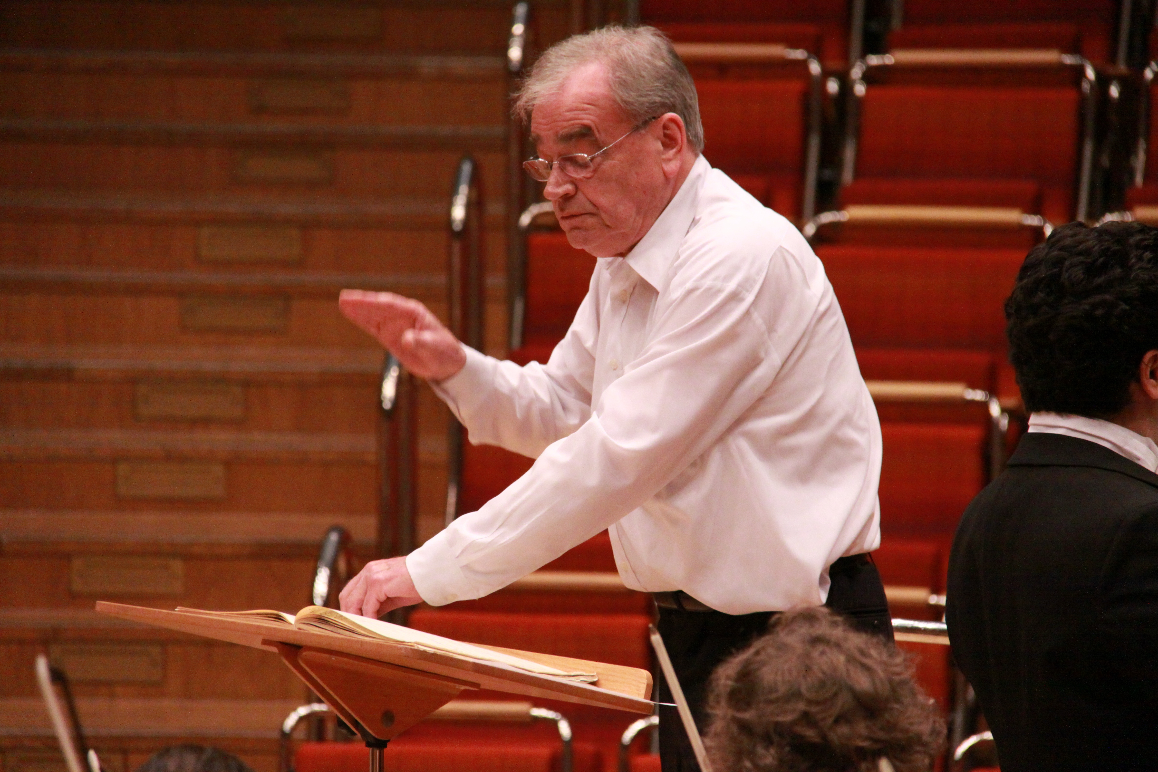 Horst Meinardus, Foto: Beat Fehlmann, 2011